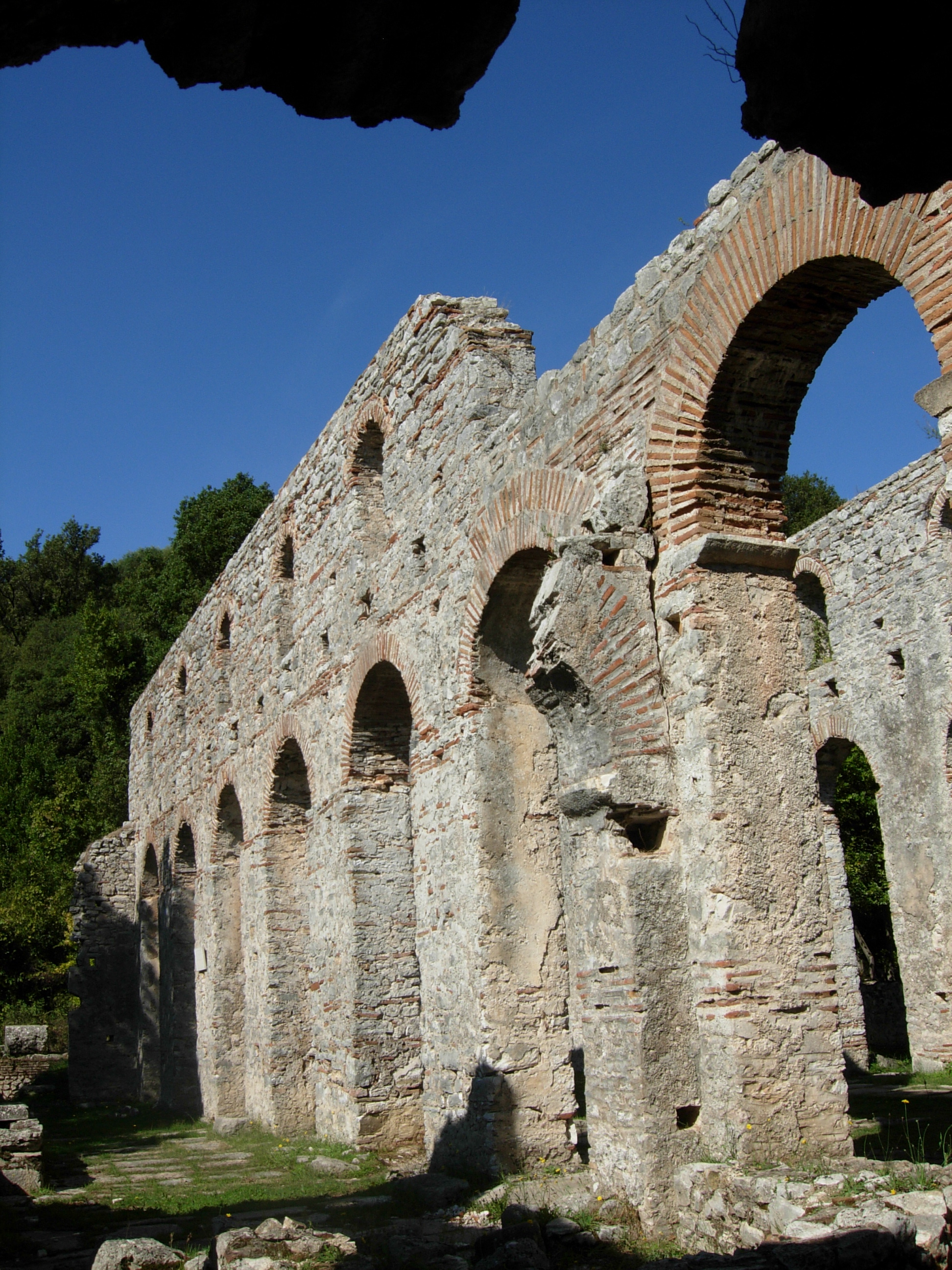 Butrint, Albania